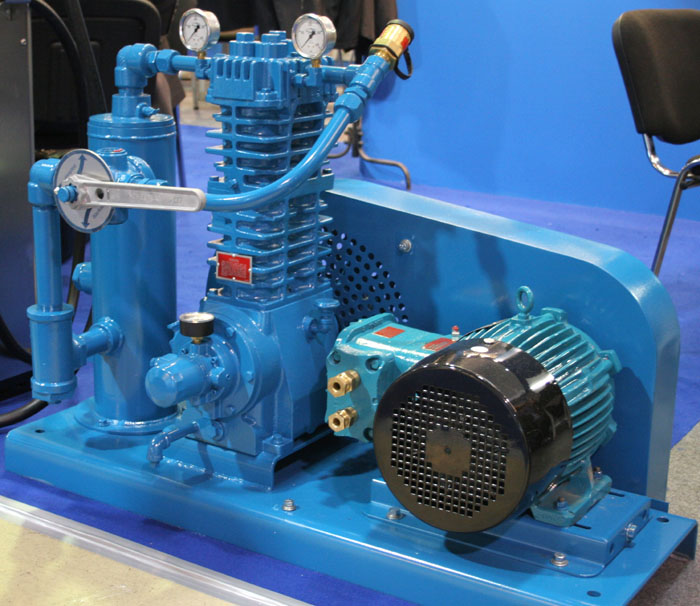 Компрессор Corcen для перекачки паровой фазы СУГ